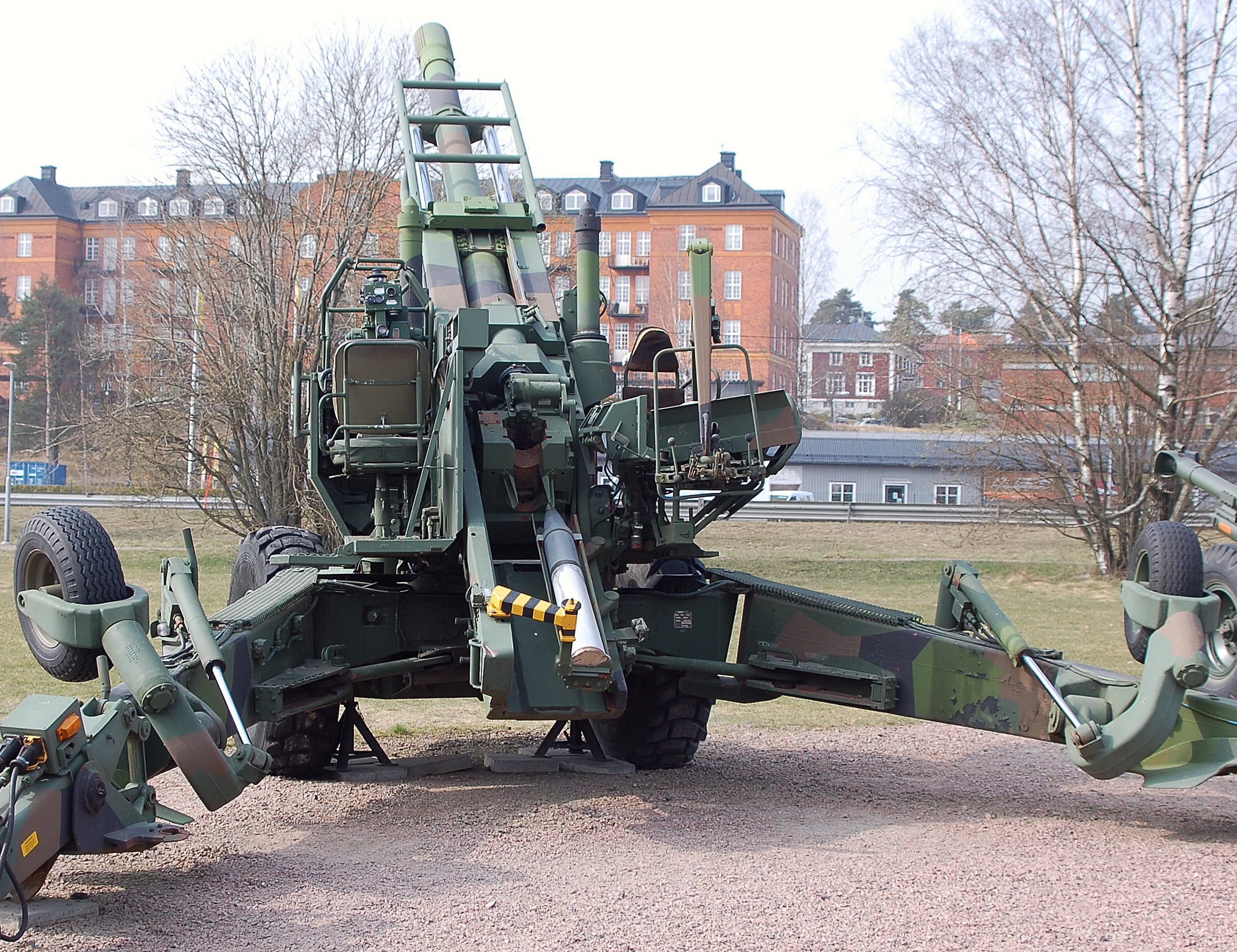 Fälthaubits 77 A statiskt utställd på Brigadmuseum i Karlstad.